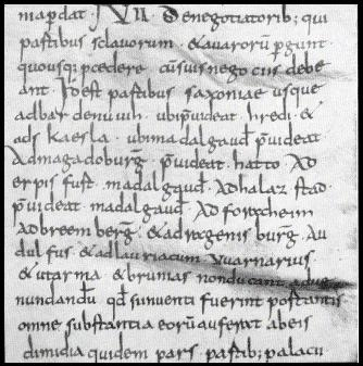 Diedenhofener Kapitular